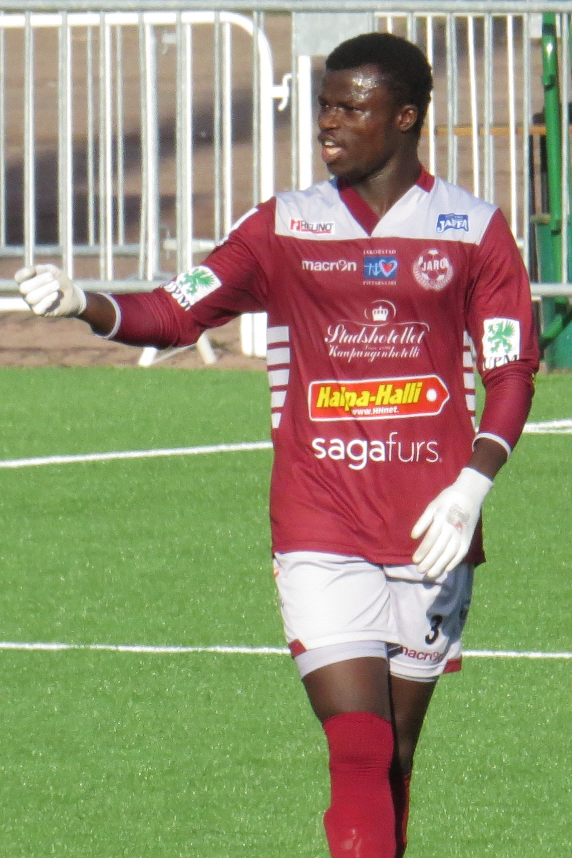 Didier Boris Kadio, norsunluurannikkolainen jalkapalloilija FF Jaron joukkueessa kaudella 2015.